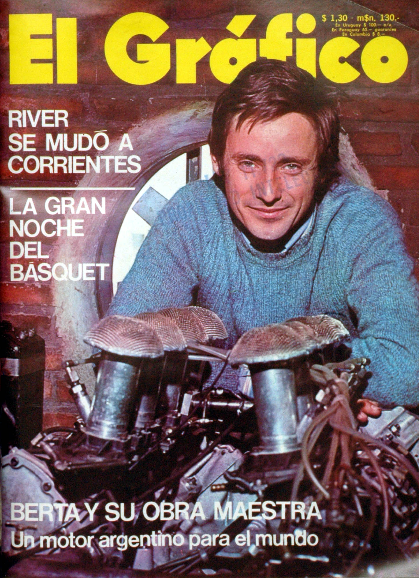 El Grafico del 20 de Julio de 1971. Edicion 2702